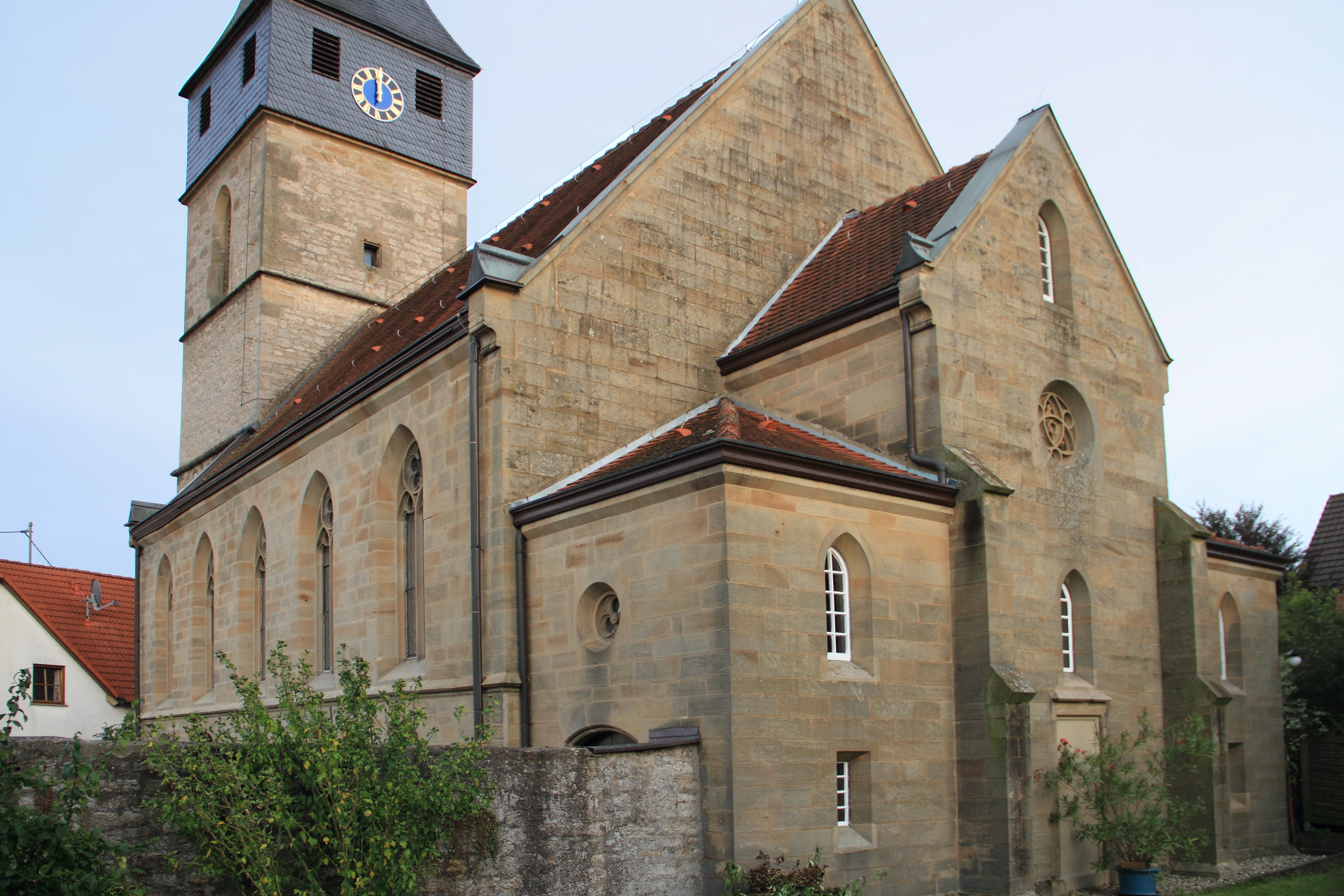 Die evangelische Pfarrkirche in Weikersheim, Ortsteil Elpersheim.